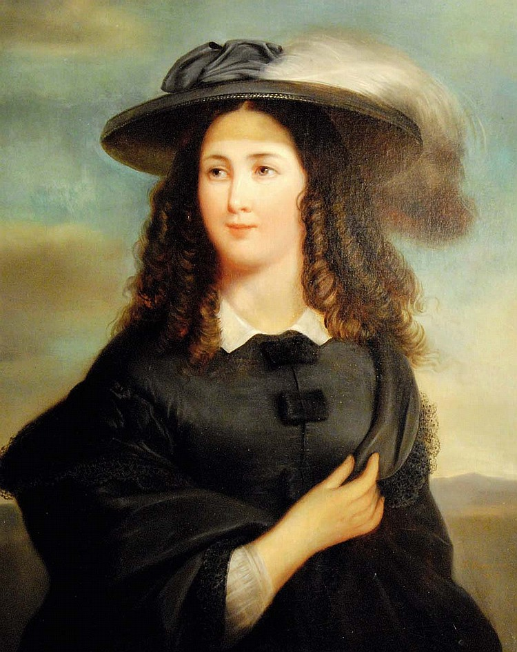 Elégante au chapeau